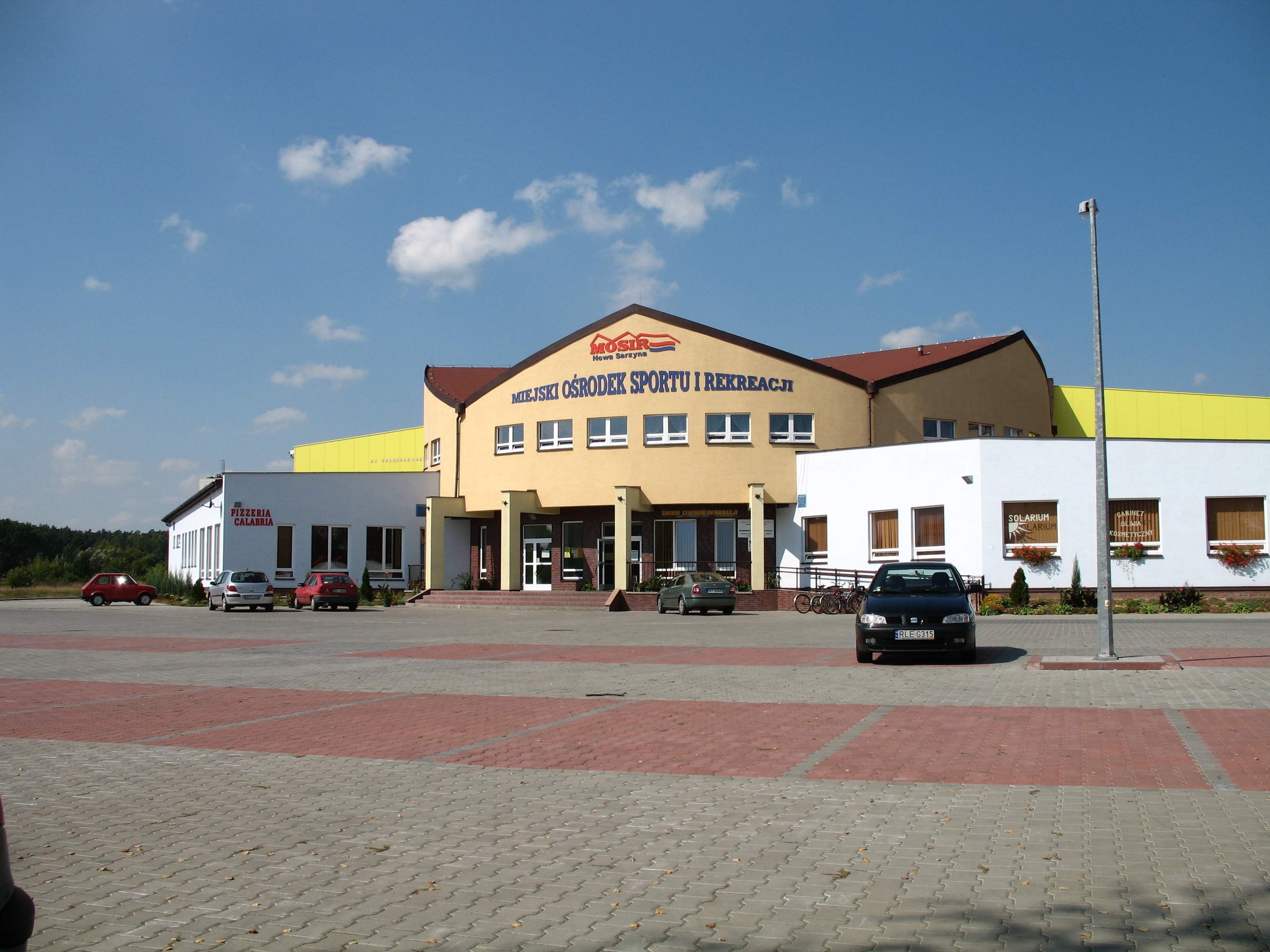 Basen w Nowej Sarzynie, author: LuCaS